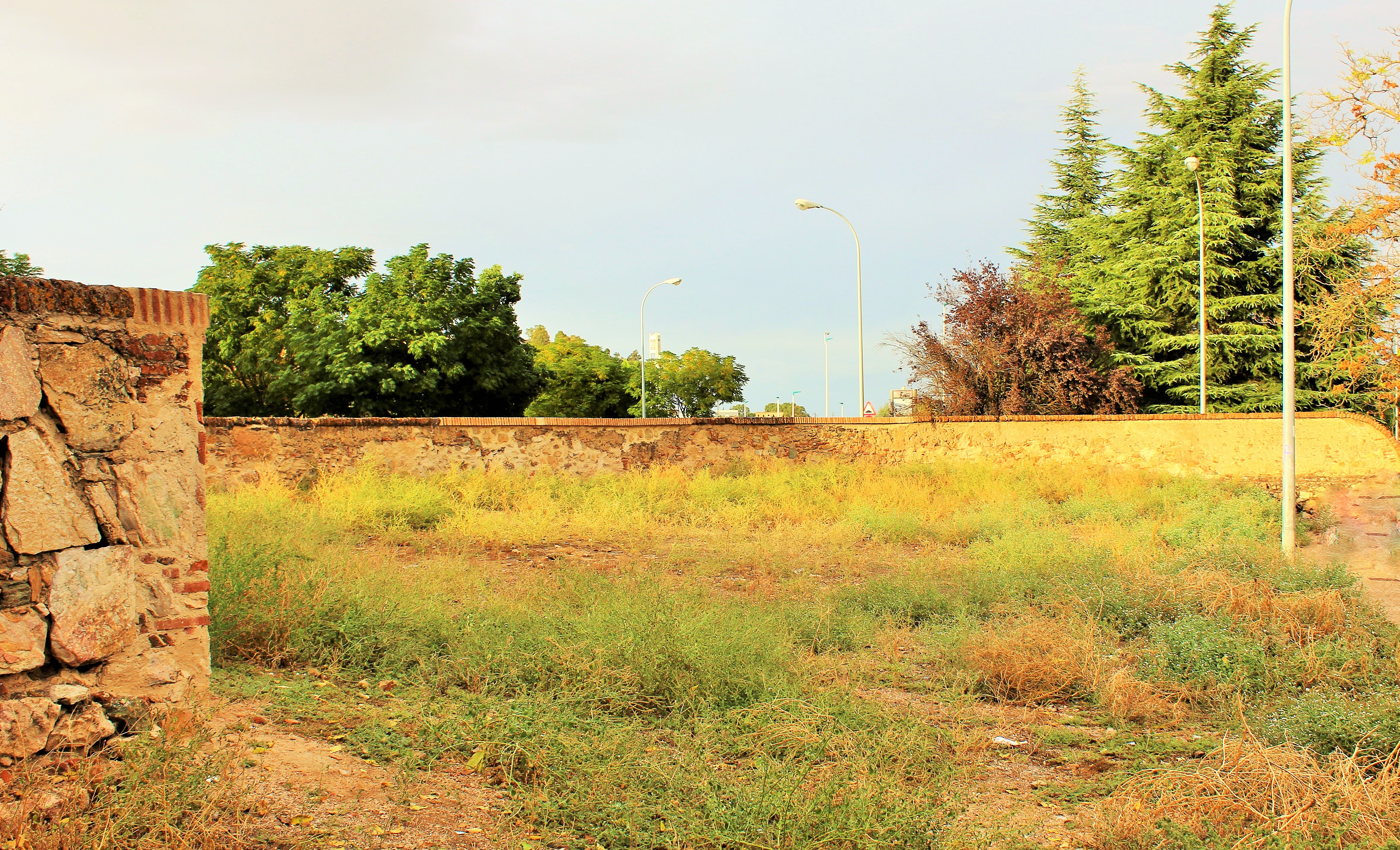 Proximidades de donde se encontraba la puerta nueva.